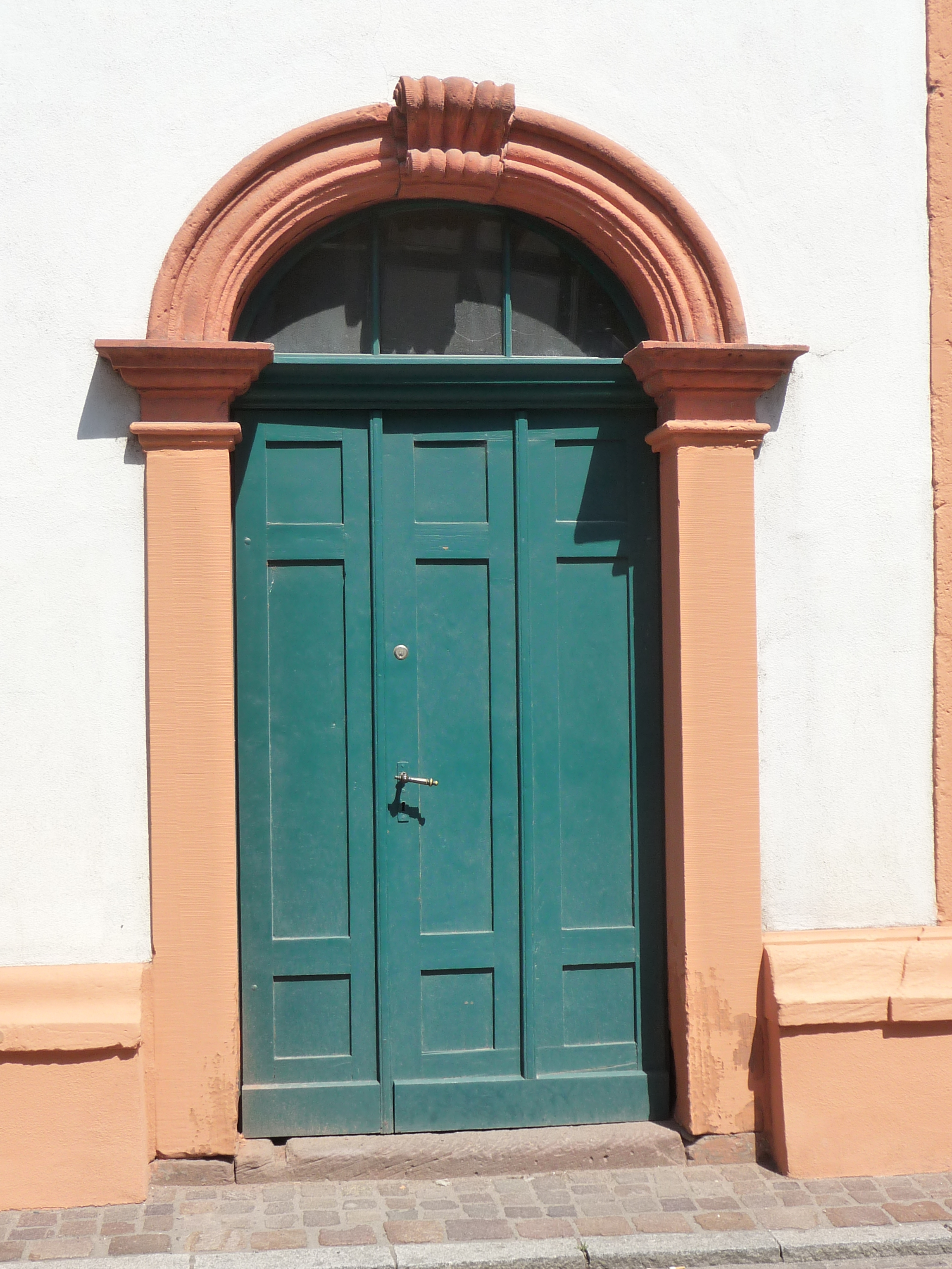 Altes Rathaus (Dirmstein)